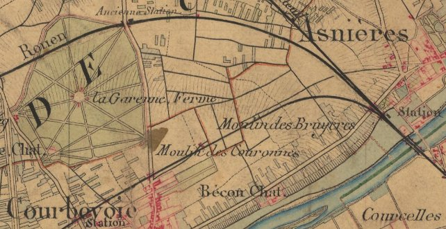 Les moulins de Bécon-les-Bruyères au XIXème siècle.